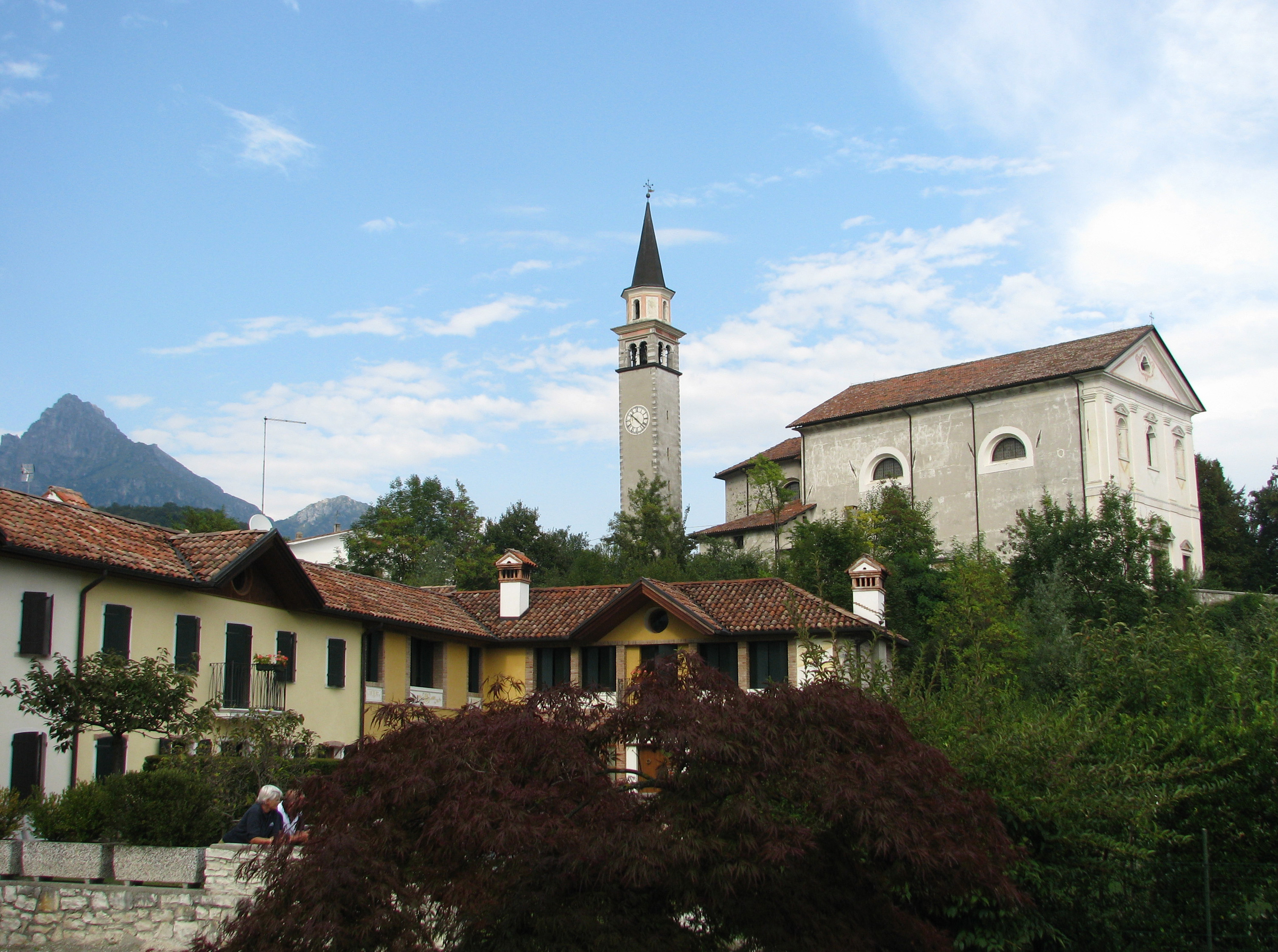 Veduta del centro di Pedavena